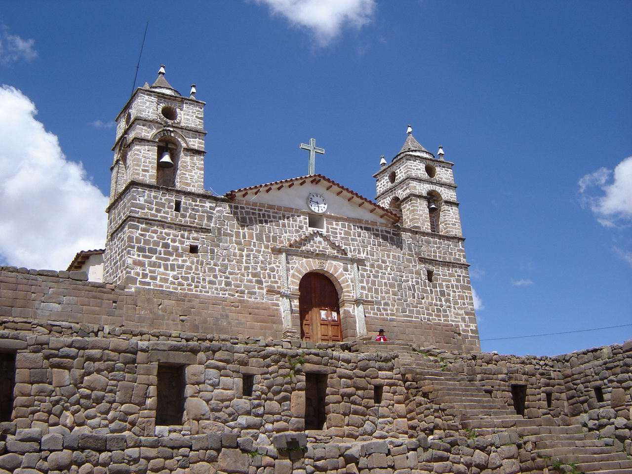 Catedral de Vilcashuamán — Peru.